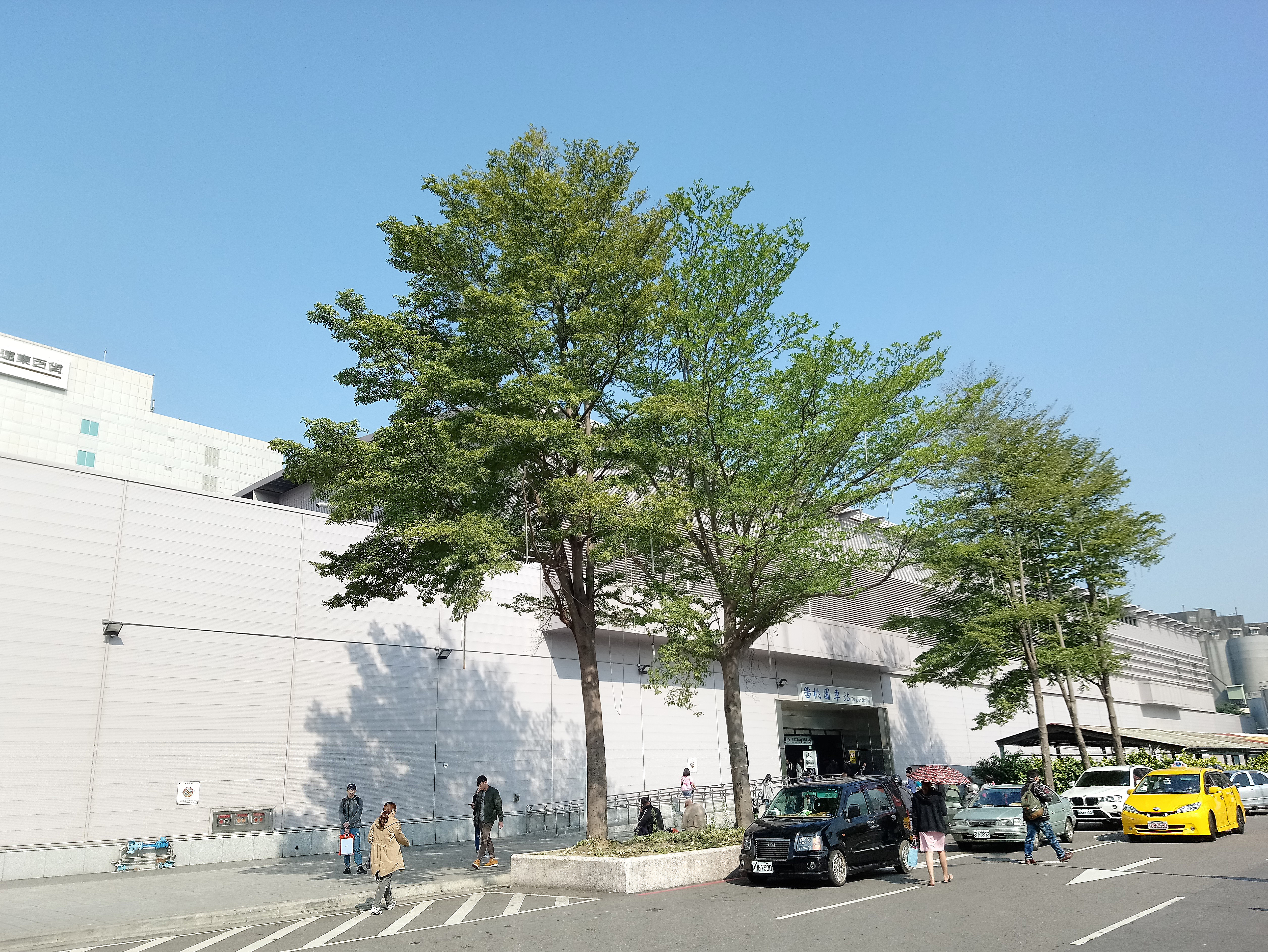 臺鐵桃園臨時車站（後站出口）,桃園市桃園區大樹林次分區建國里